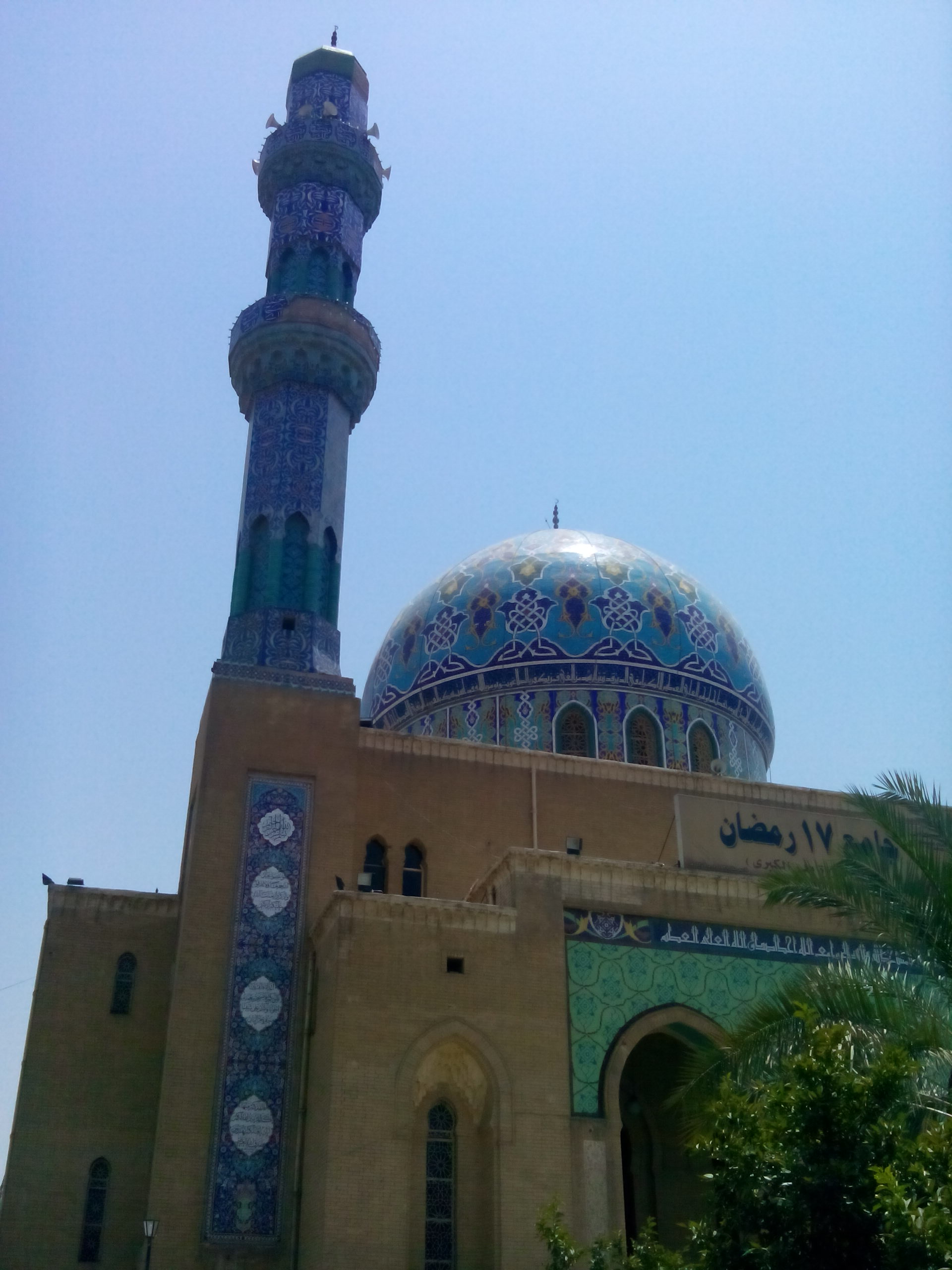 مبنى جامع 17 رمضان في ساحة الفردوس في بغداد